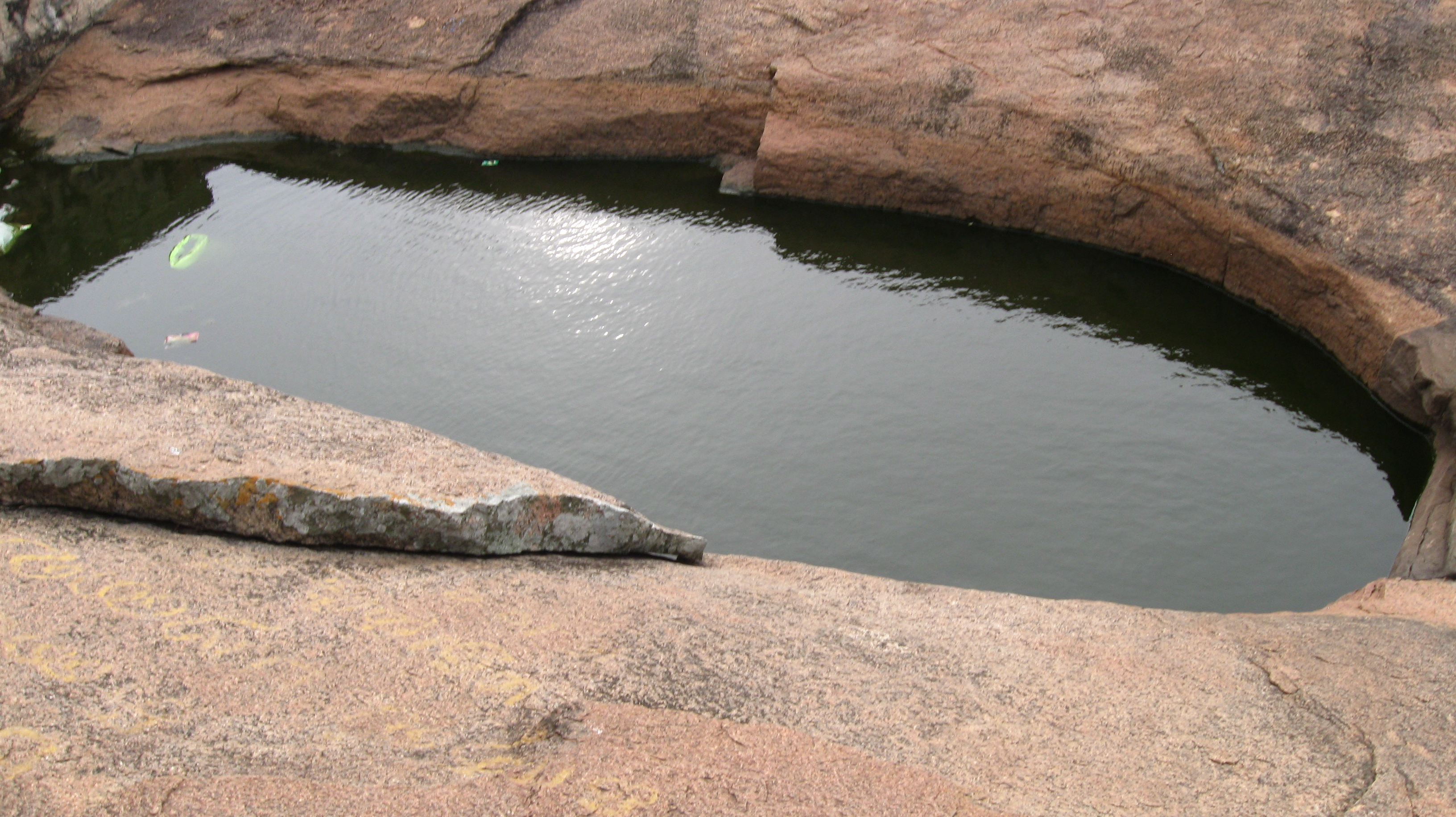 கபிலரால் வரையாது வழங்கும் வள்ளியாய்ப் புகழப்பட்ட பாரியாண்ட பறம்பு மலையின் தேன்சுவைத் தண்ணீர் நிறைந்த பைஞ்சுனையின் அரிய காட்சி